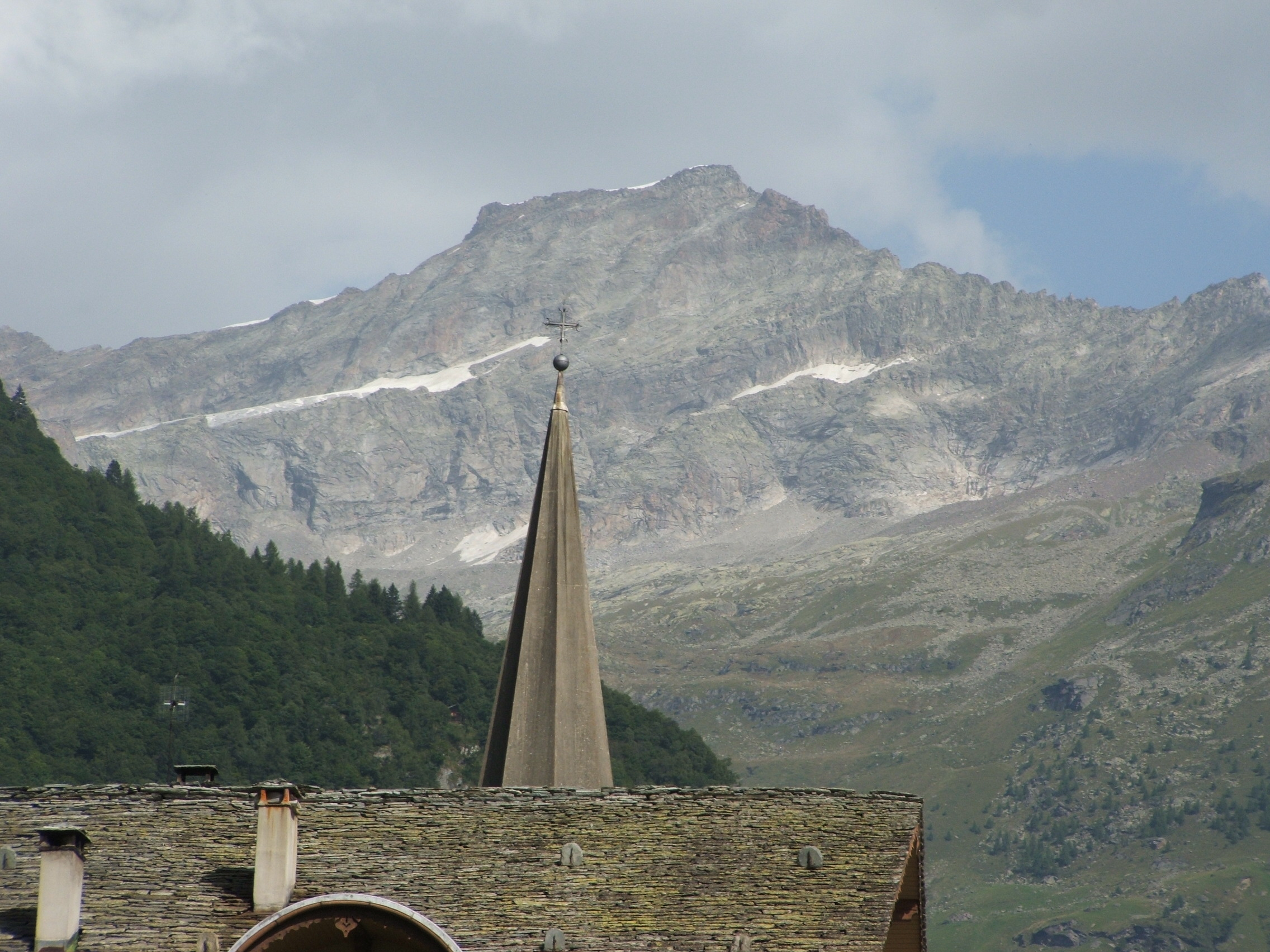 La Punta Grober m.3497 l'unica cima del Monte Rosa visibile dal paese diAlagna Valsesia.